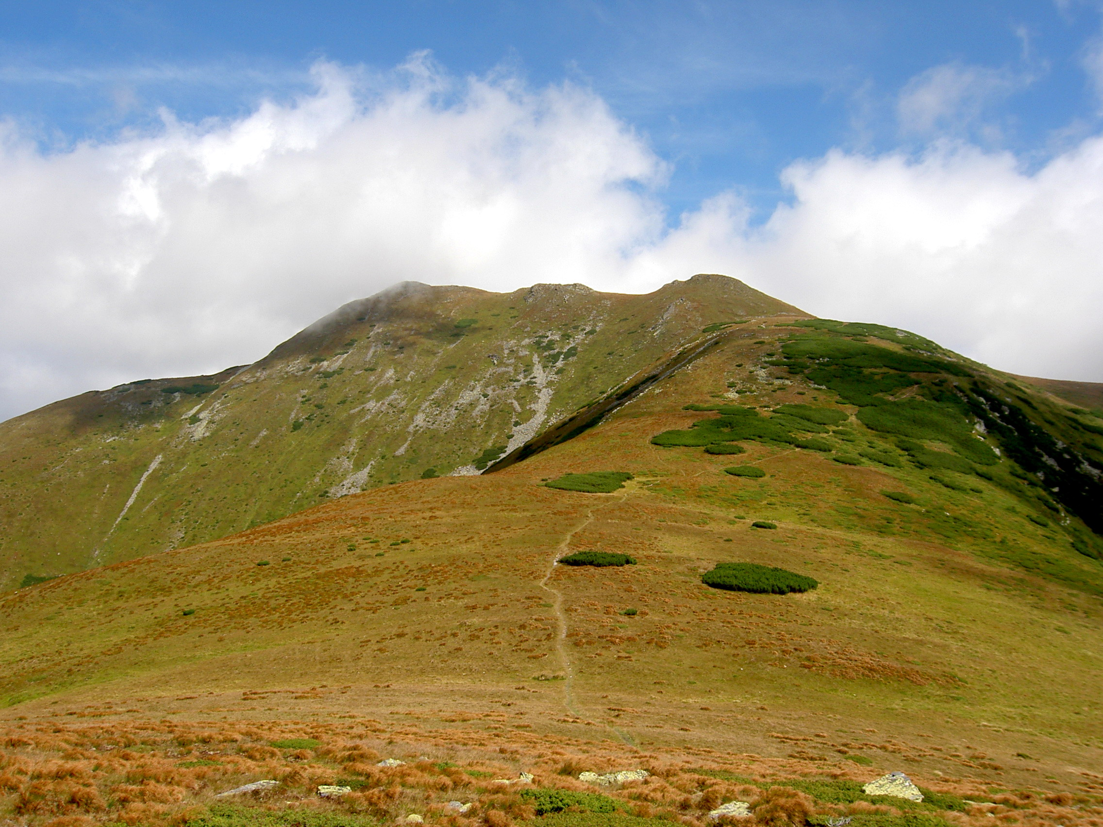 Rodna